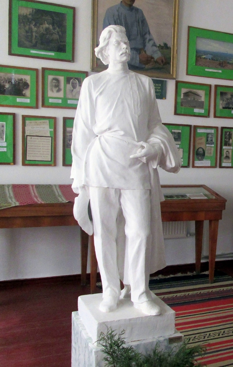 Гіпсовий скульптурний портрет Максима Горького роботи Івана Гончара. Мануйлівський літературно-меморіальний музей Максима Горького у селі Верхня Мануйлівка (Козельщинський район, Полтавська область, Україна).